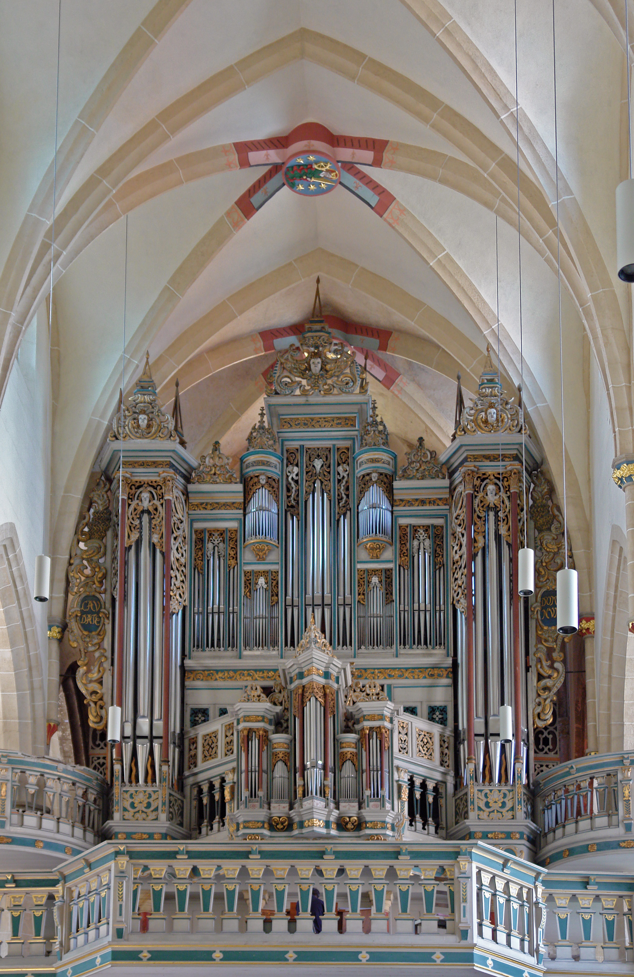 Orgel der Predigerkirche in Erfurt (Thuringia, Germany).